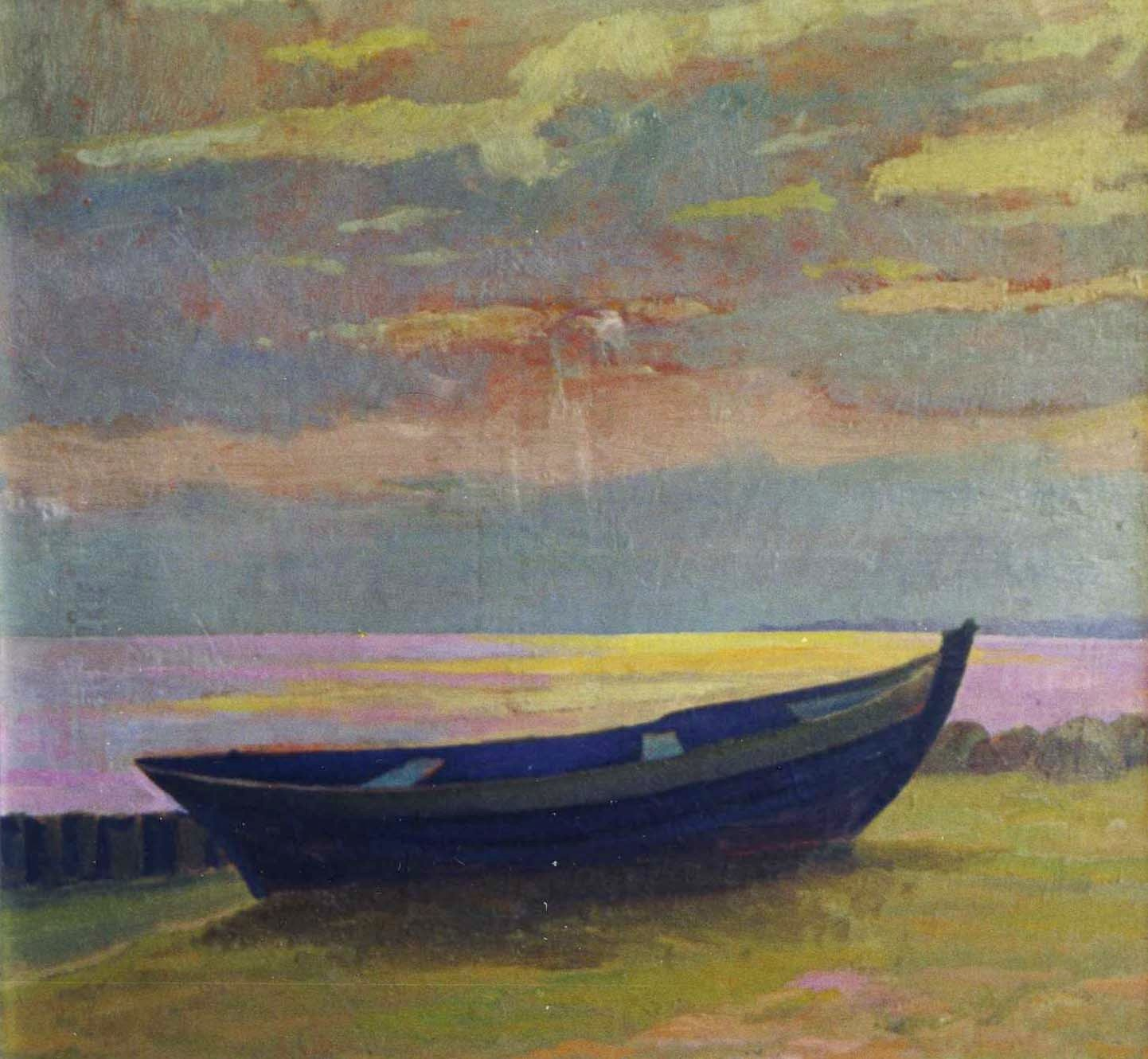 Bałtyk (Baltic Sea)